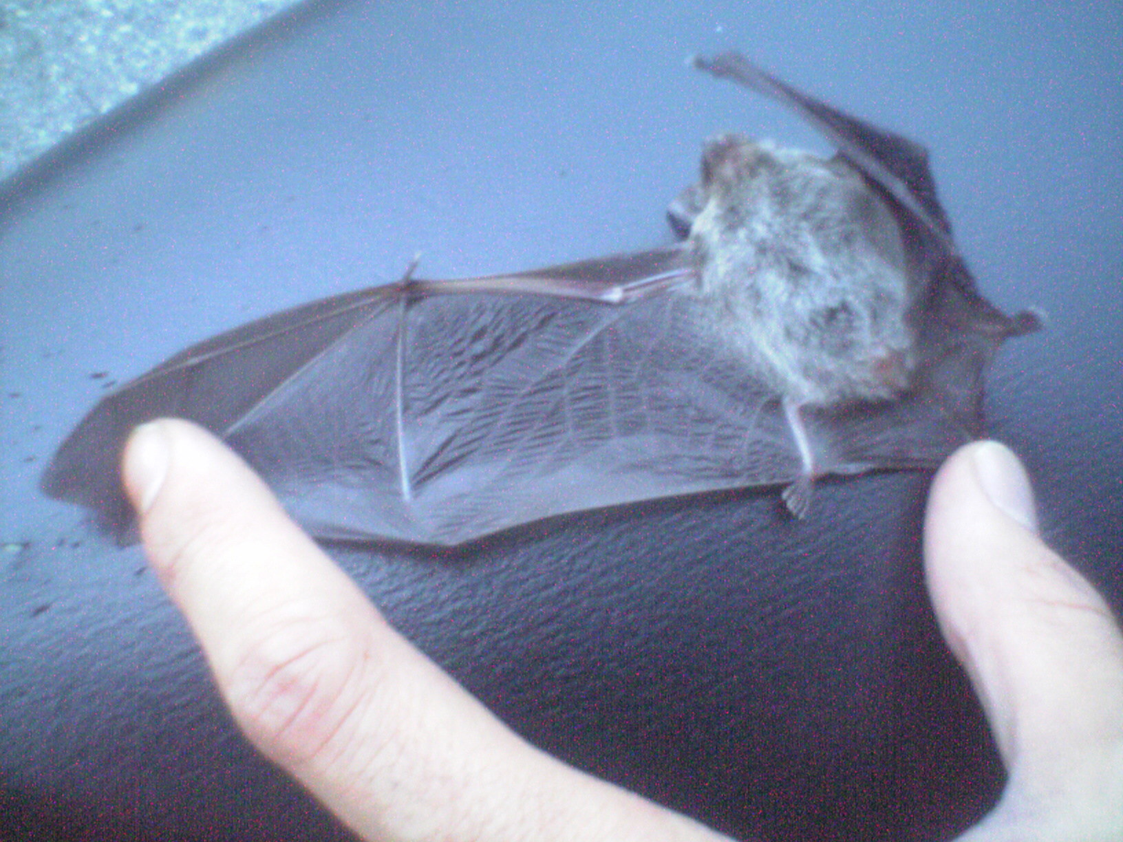 アブラコウモリの腹部を開翼して。 （オートバイ運転中、メットに激突して即死した直後のアブラコウモリ）